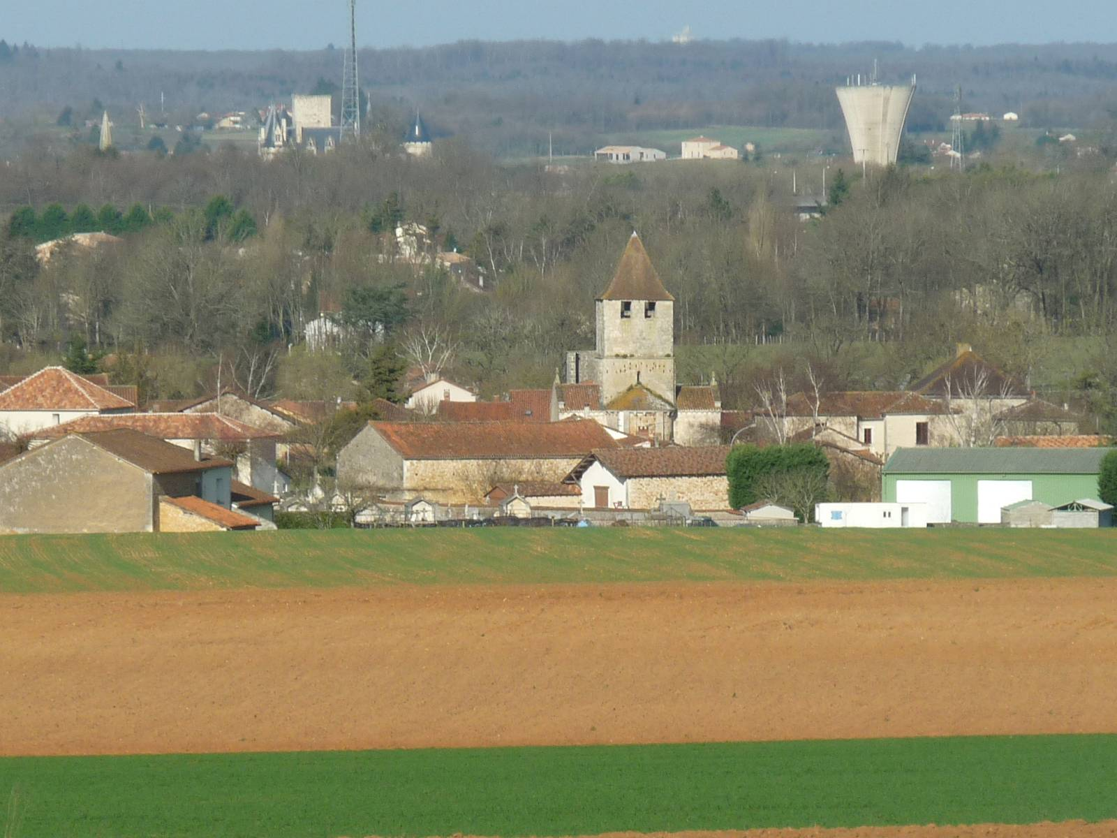 vue de l'est de Marillac-le-Franc, Charente, France; au loin le château de La Rochefoucauld